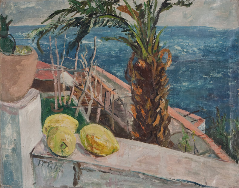 Hermann Euler, Positano, 1928, Öl auf Leinwand, 65x85 cm